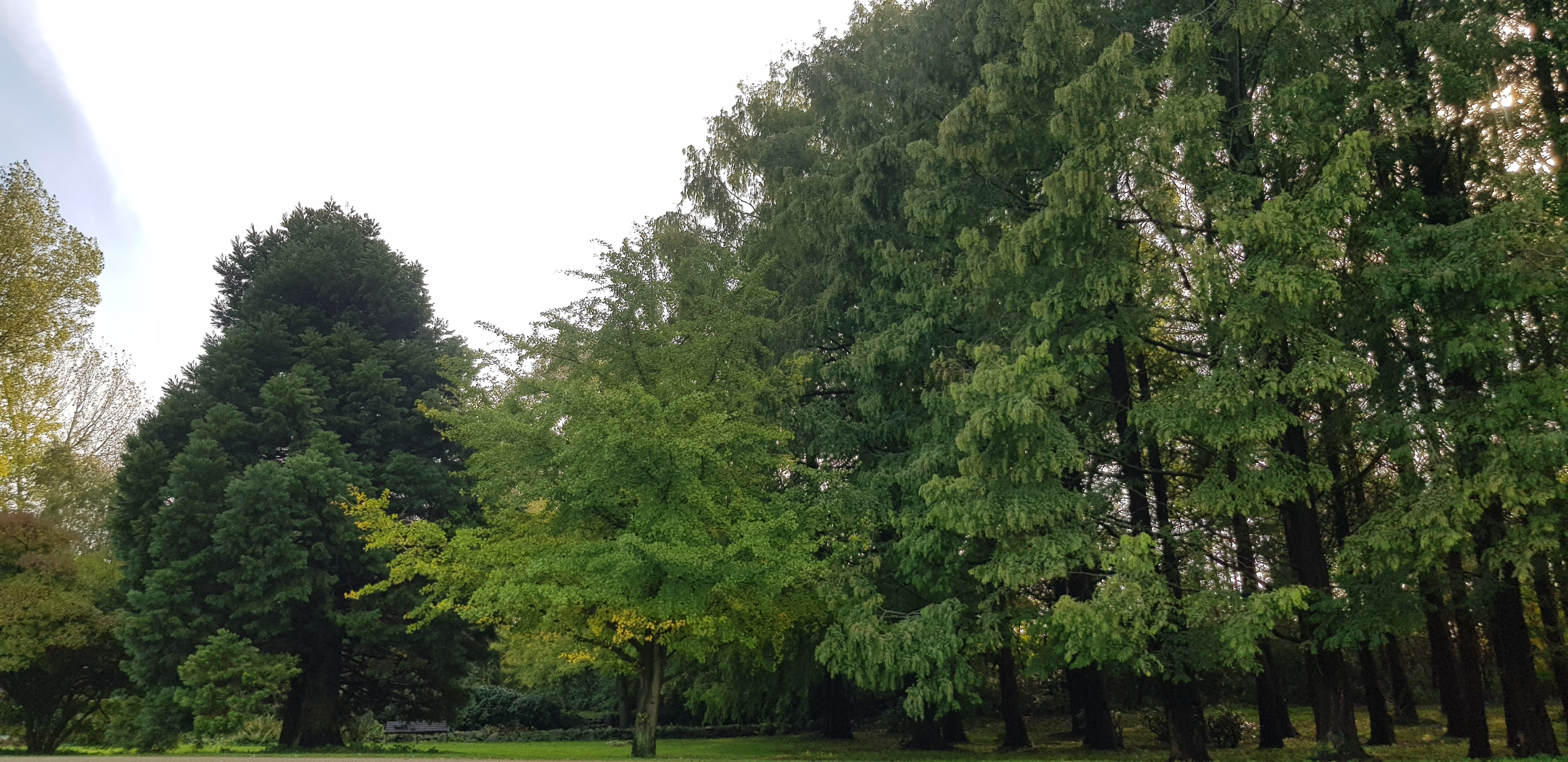 Valbyparken, lund af Vandgraner -Metasequoia flankeret af Mammuttræer -Sequoiadendron samt et Tempeltræ -Ginkgo